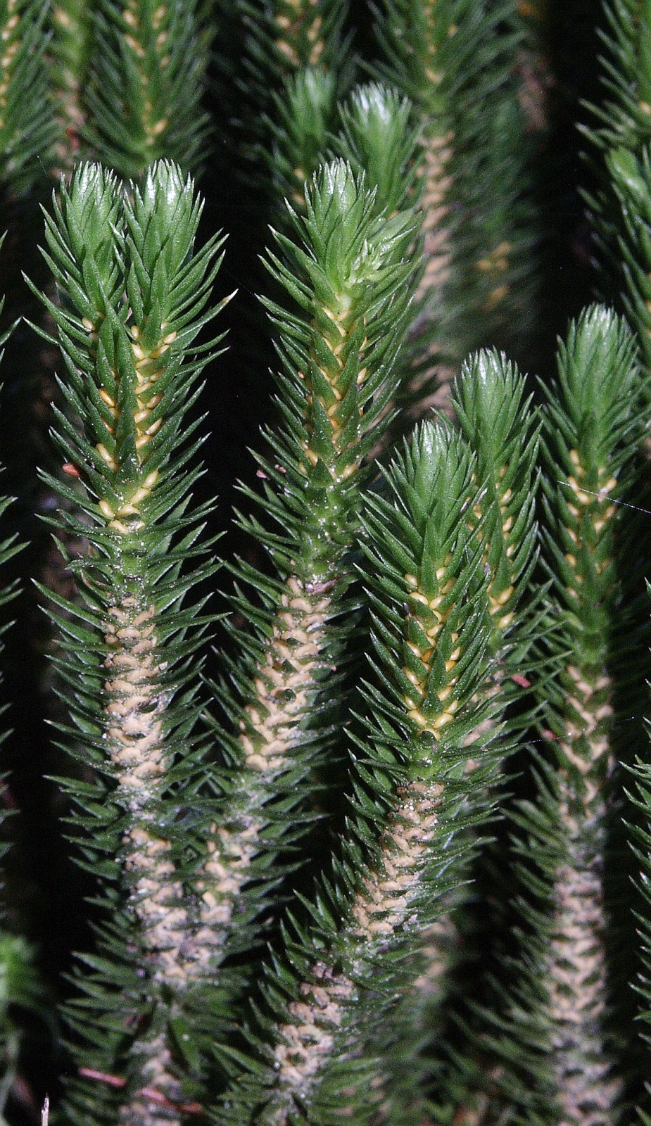 Huperzia selago, Virngrund, Germany